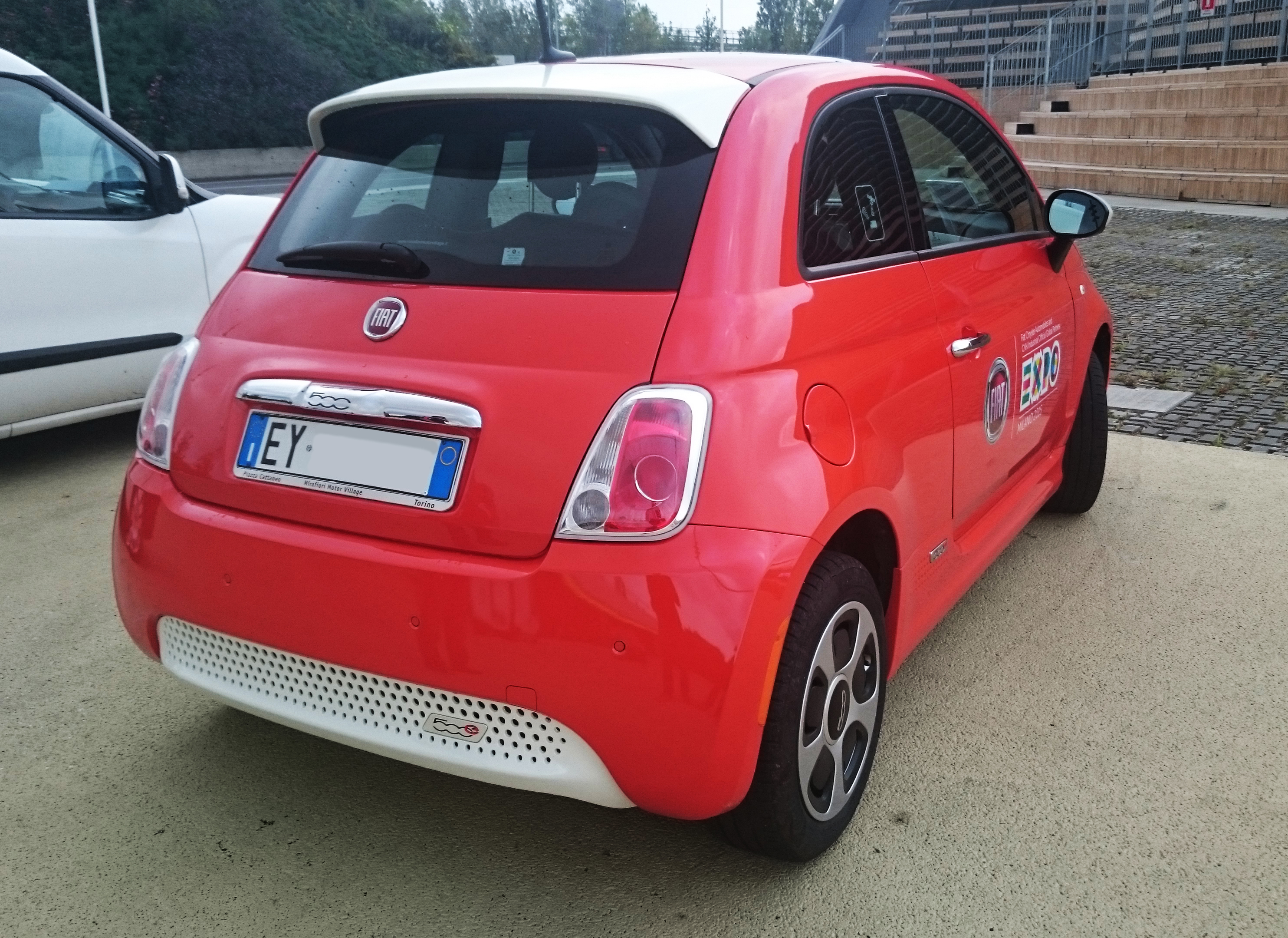 Fiat 500e all'Esposizione universale EXPO MILANO 2015